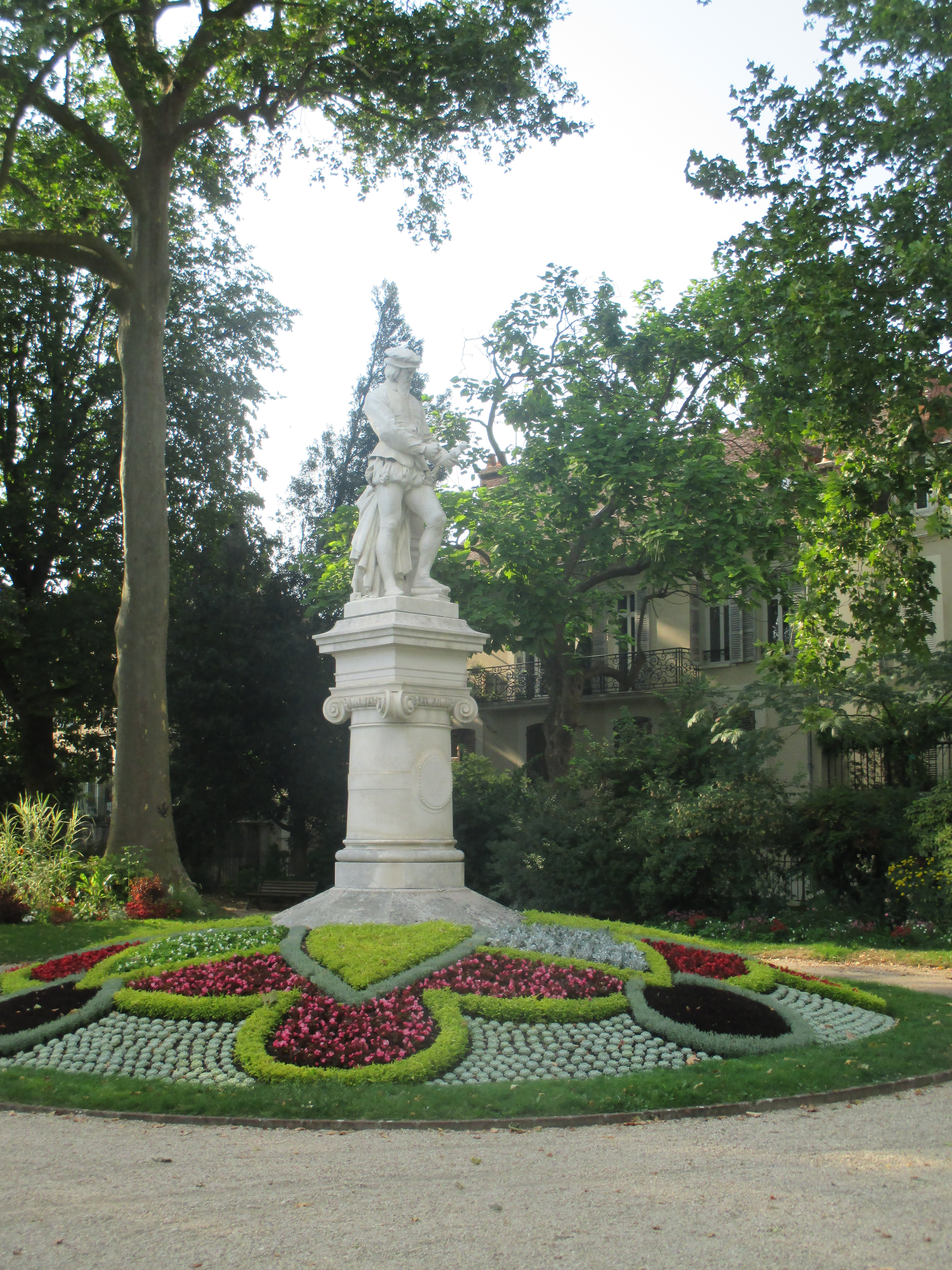 Jardin public de Sens. Statue de Jean Cousin.